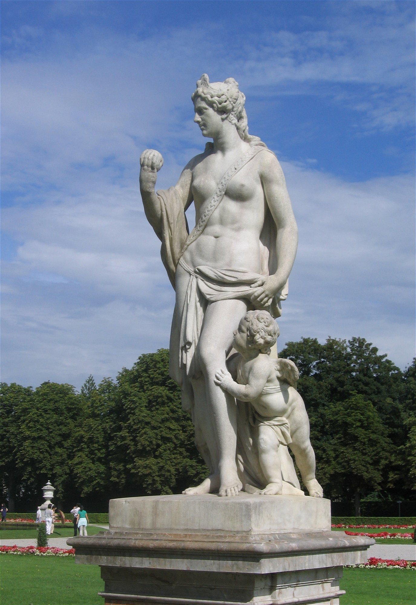 Venus von Roman Anton Boos (1778), im Schlosspark Nymphenburg